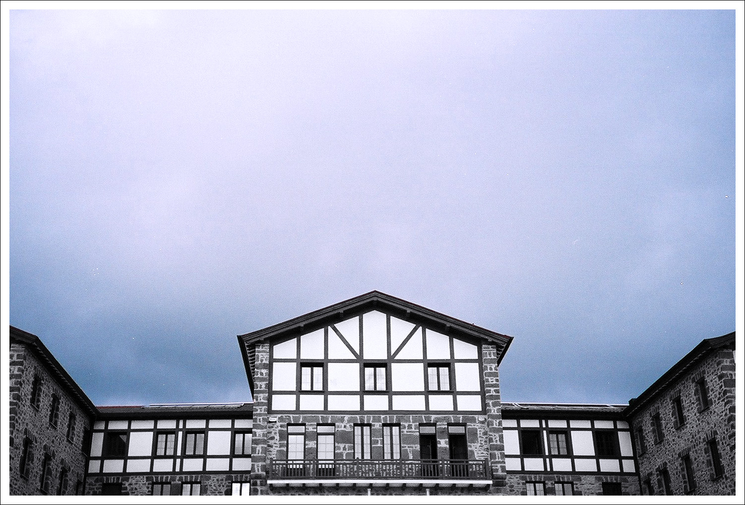 Amurrioko erreformategi zaharra.